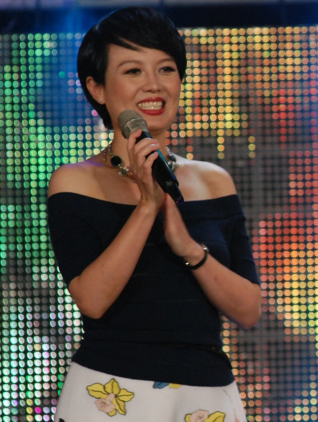 苗可麗主持三立電視綜藝節目《超級夜總會》。